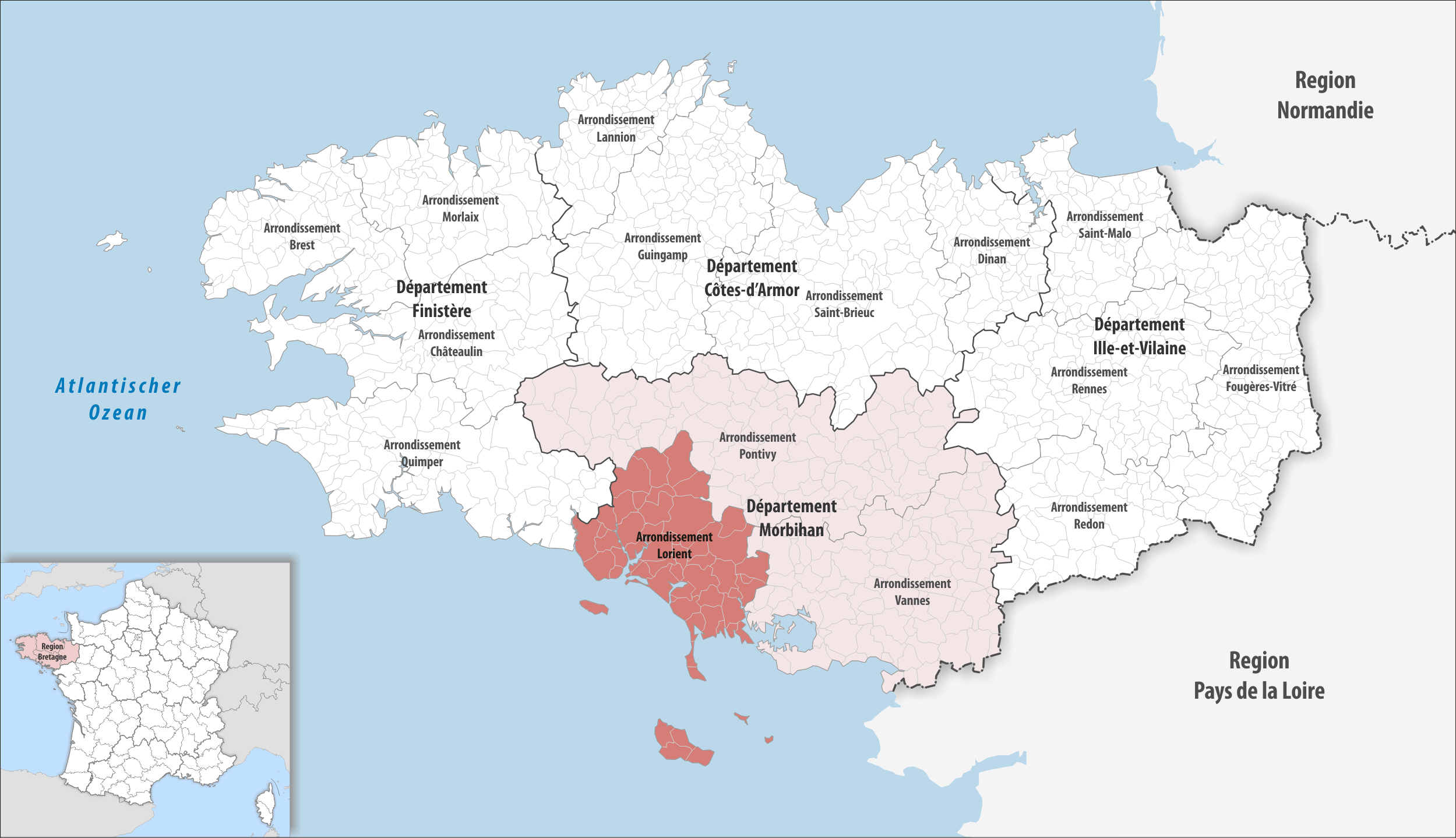 Lage des Arrondissements Lorient